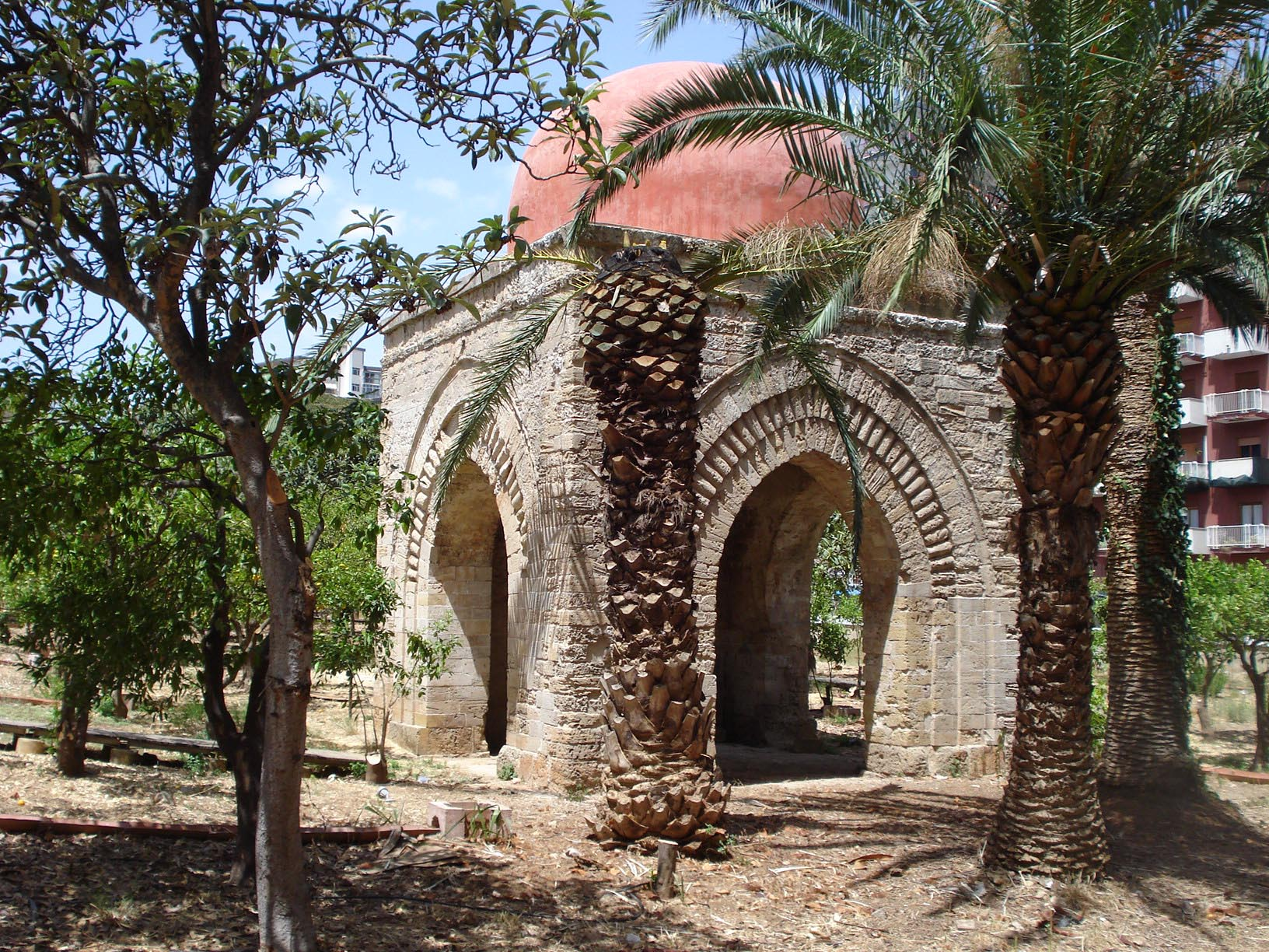 La Cubola (Palermo)